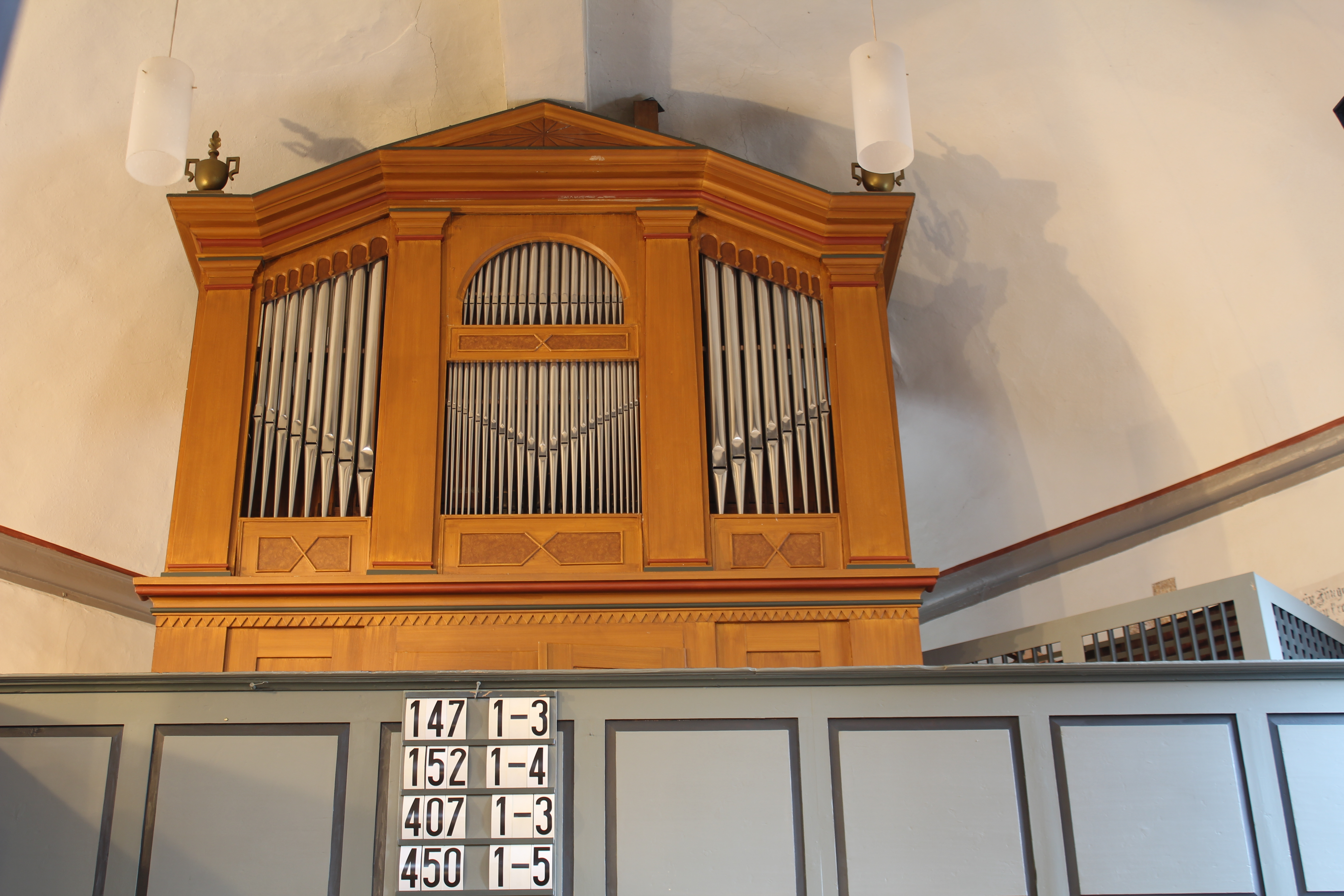 Evangelische Kirche Ruppertenrod, Mücke, Vogelsbergkreis, Hessen, Deutschland